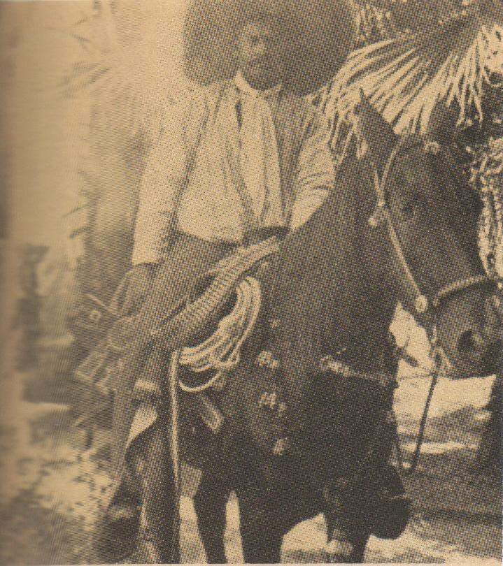 General Próculo Capistrán